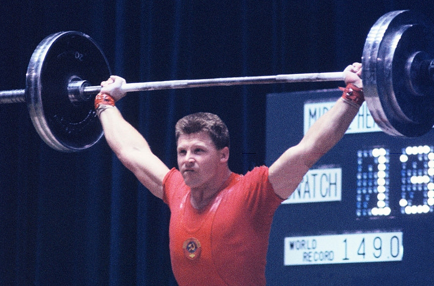 Vladimir Golovanov, 1964 Olympics